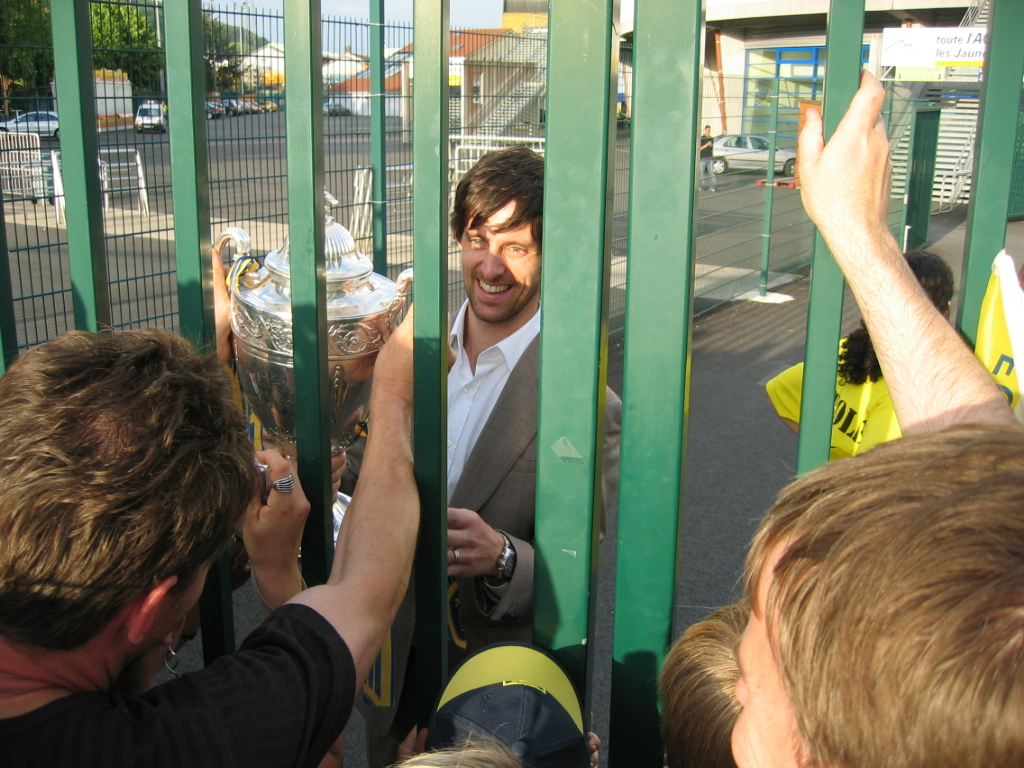 Jérémie Bréchet, capitaine du FC Sochaux, vainqueur de la Coupe de France 2007, jour du retour du FC Sochaux du Stade de France à Sochaux